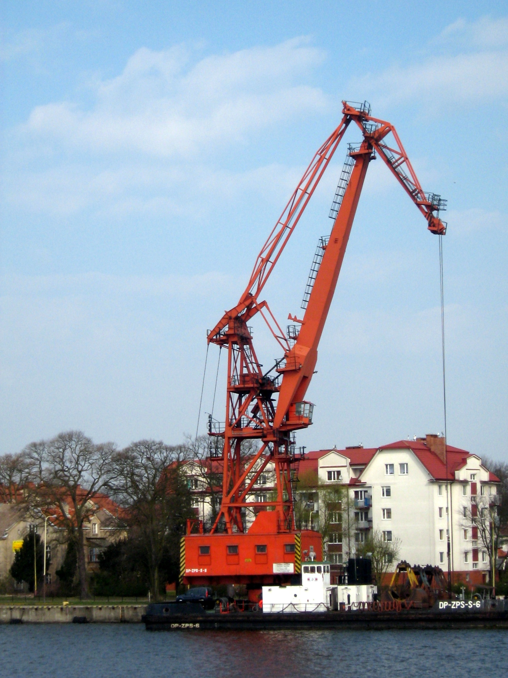 Dźwig pływający